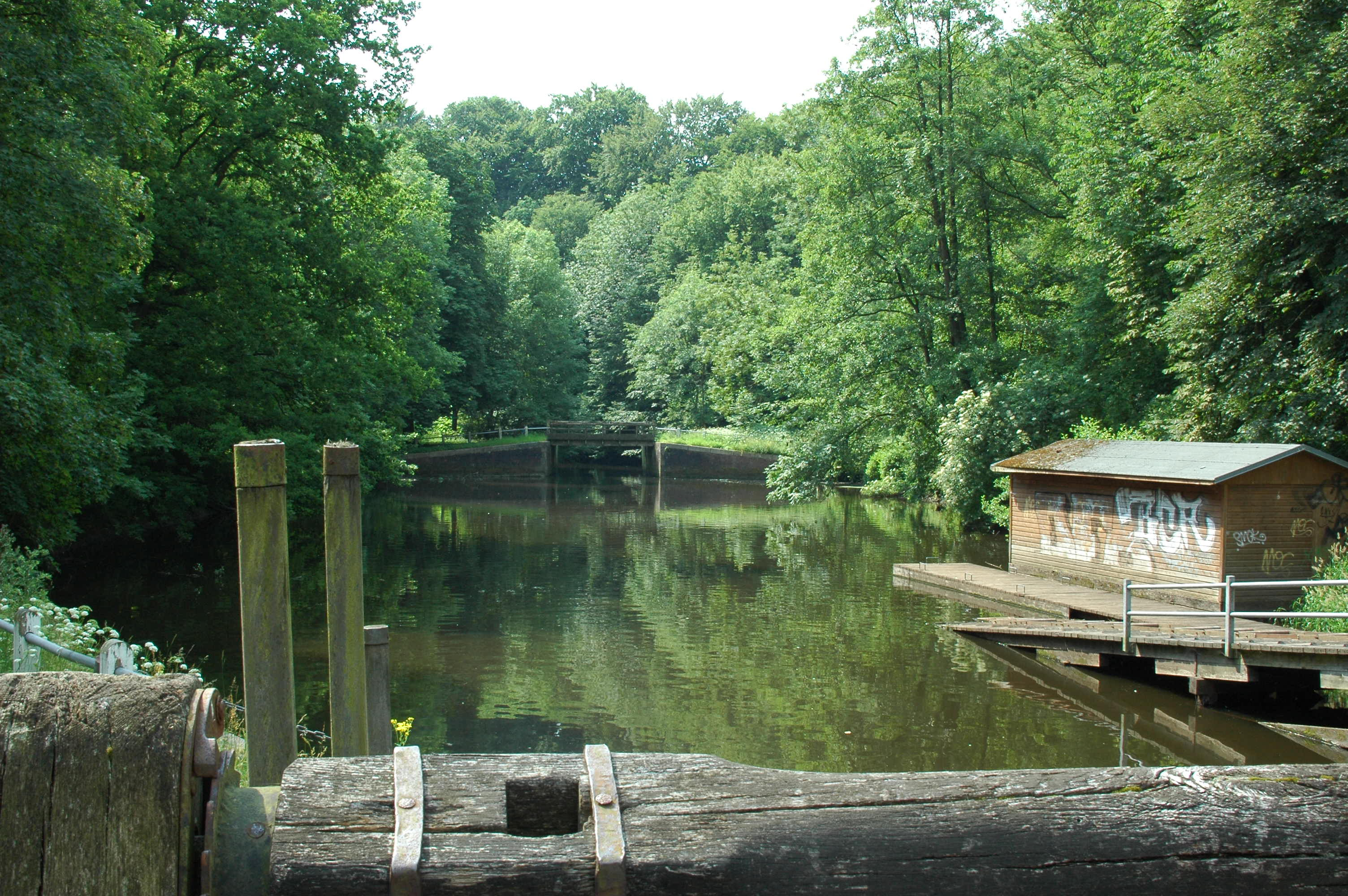 Hamburg Alstertal Mellingburger Schleuse This is a photograph of an architectural monument.